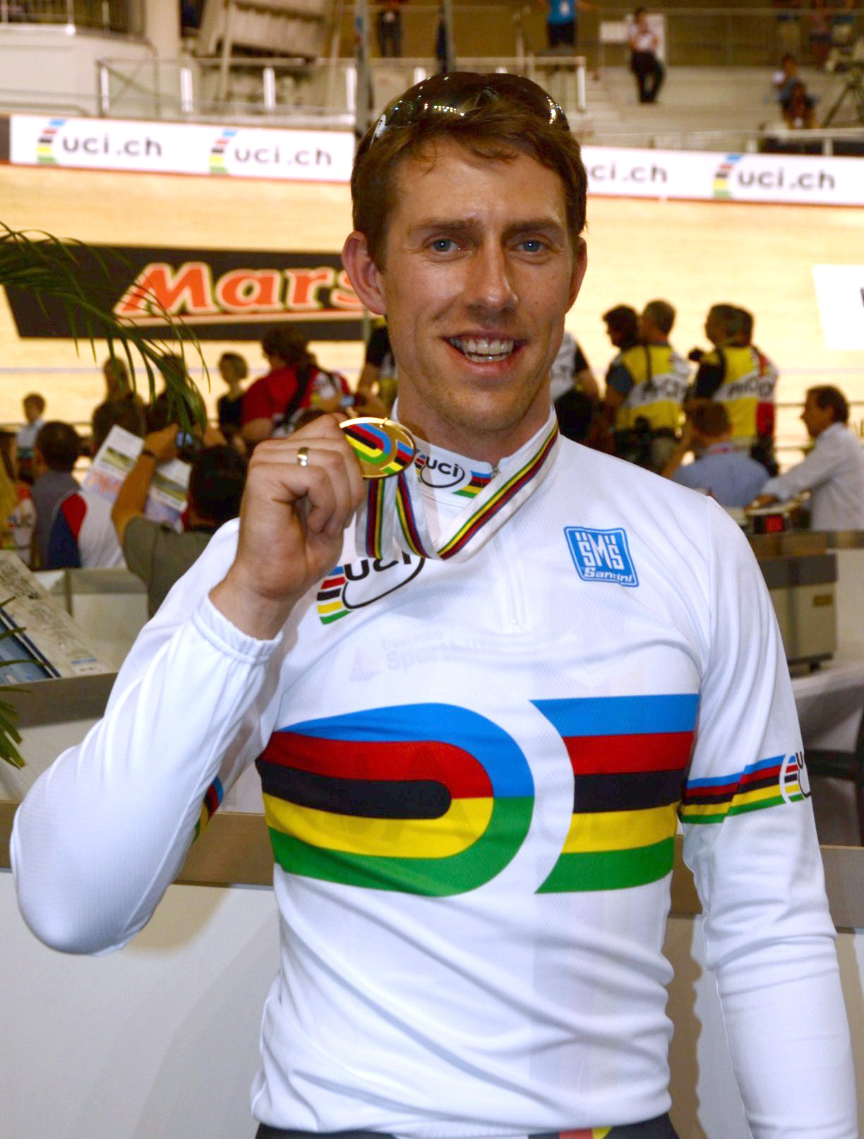 Stefan Nimke, deutscher Bahnradsportler, Bahn-Weltmeisterschaften 2012 in Melbourne